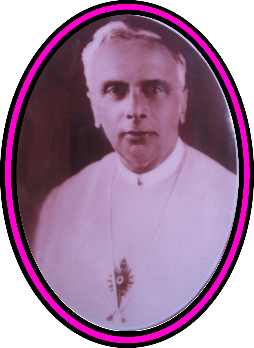 Bp.Wawrzyniec Maria Franciszek Rostworowski - fotografia z nagrobka